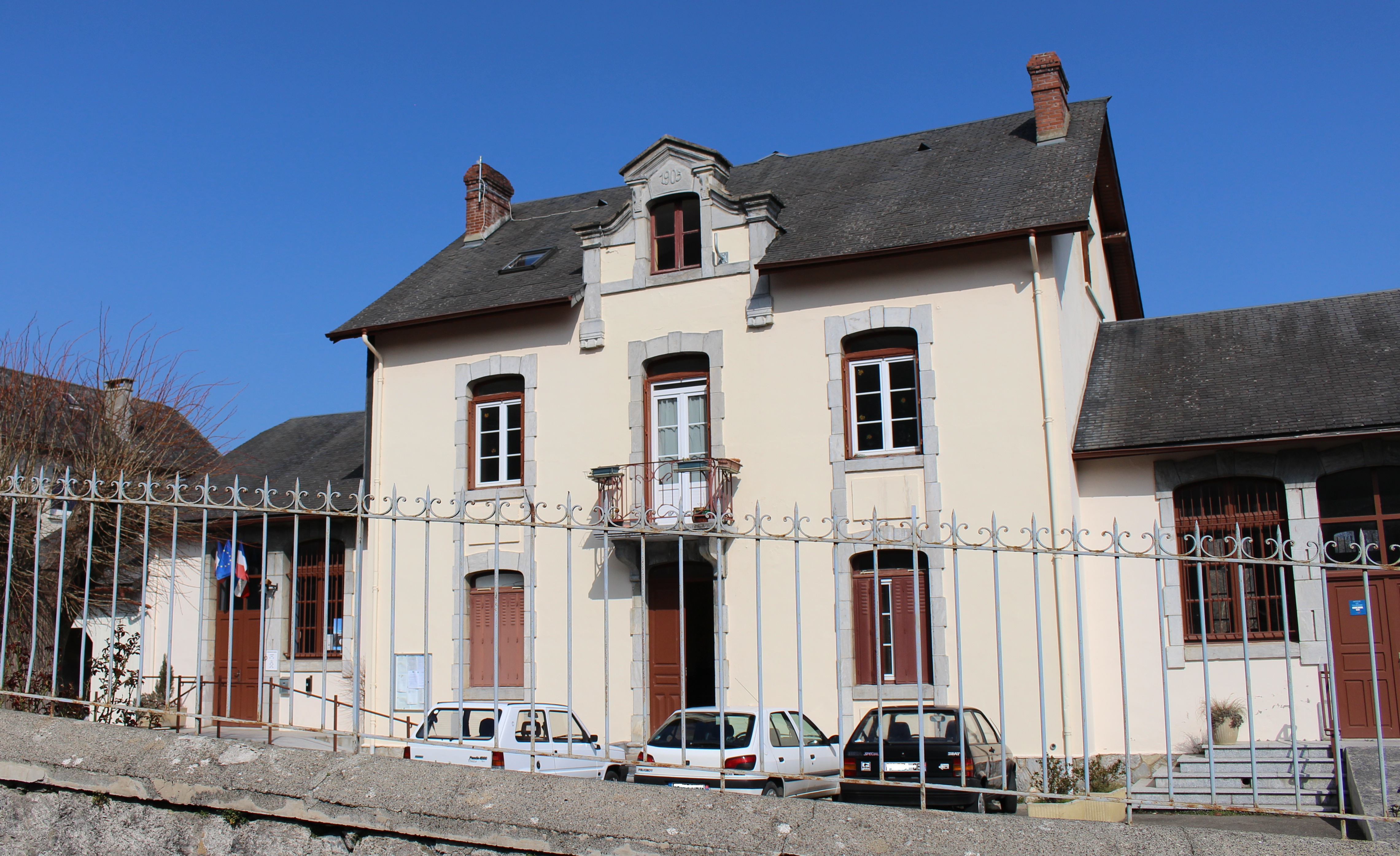 Mairie de Ségus (Hautes-Pyrénées)